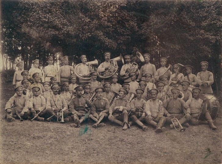 Военният духов оркестър на 19-и пехотен шуменски полк при село Топчии, Разградско.